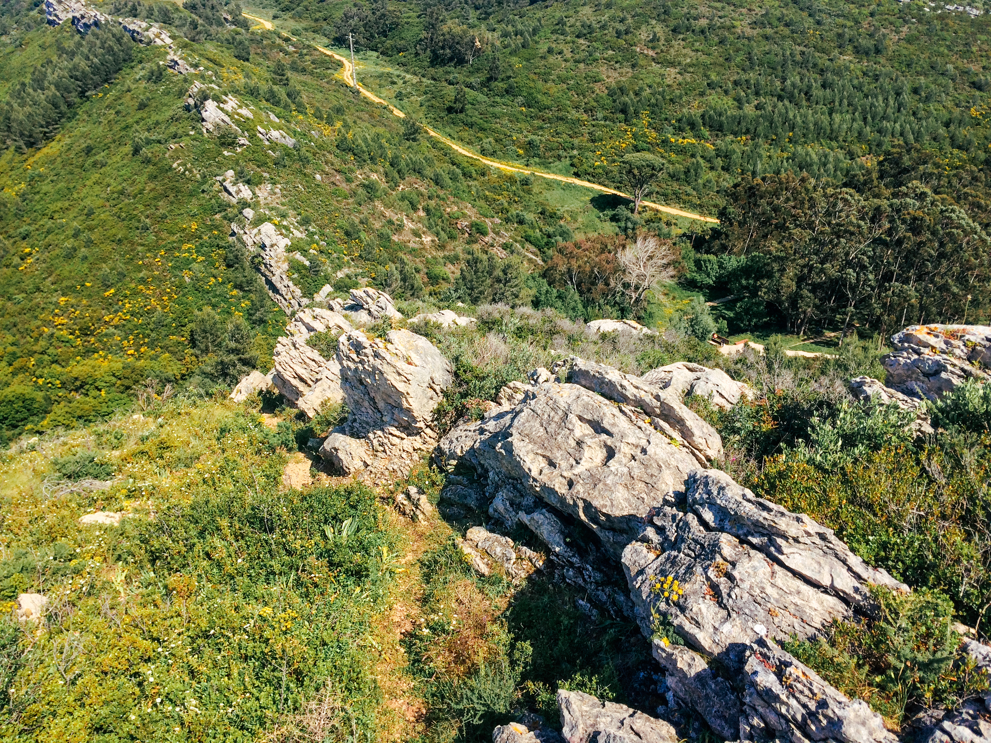 Afloramentos rochosos.